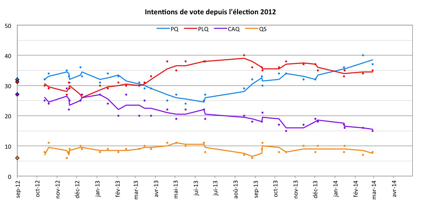 Évolution des intentions de vote au Québec depuis l'élection générale de 2012 selon les sondages réalisés par CROP et Léger Marketing. Les points représentent les résultats de sondages individuels. Les lignes représentent la moyenne mouvante des deux derniers sondages.